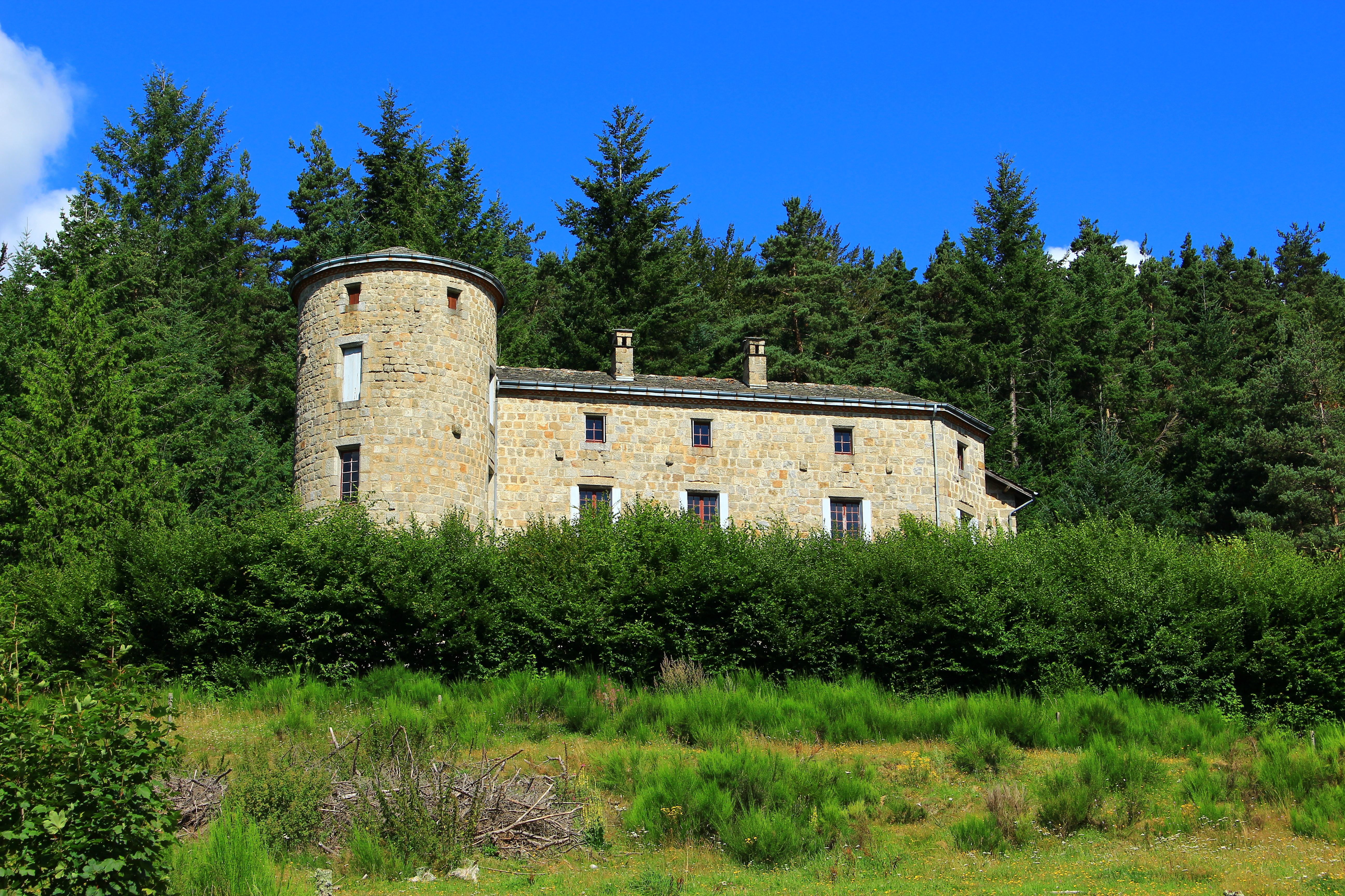 Château du Pont-de-Mars Le Chambon-sur-Lignon, France. Août 2016